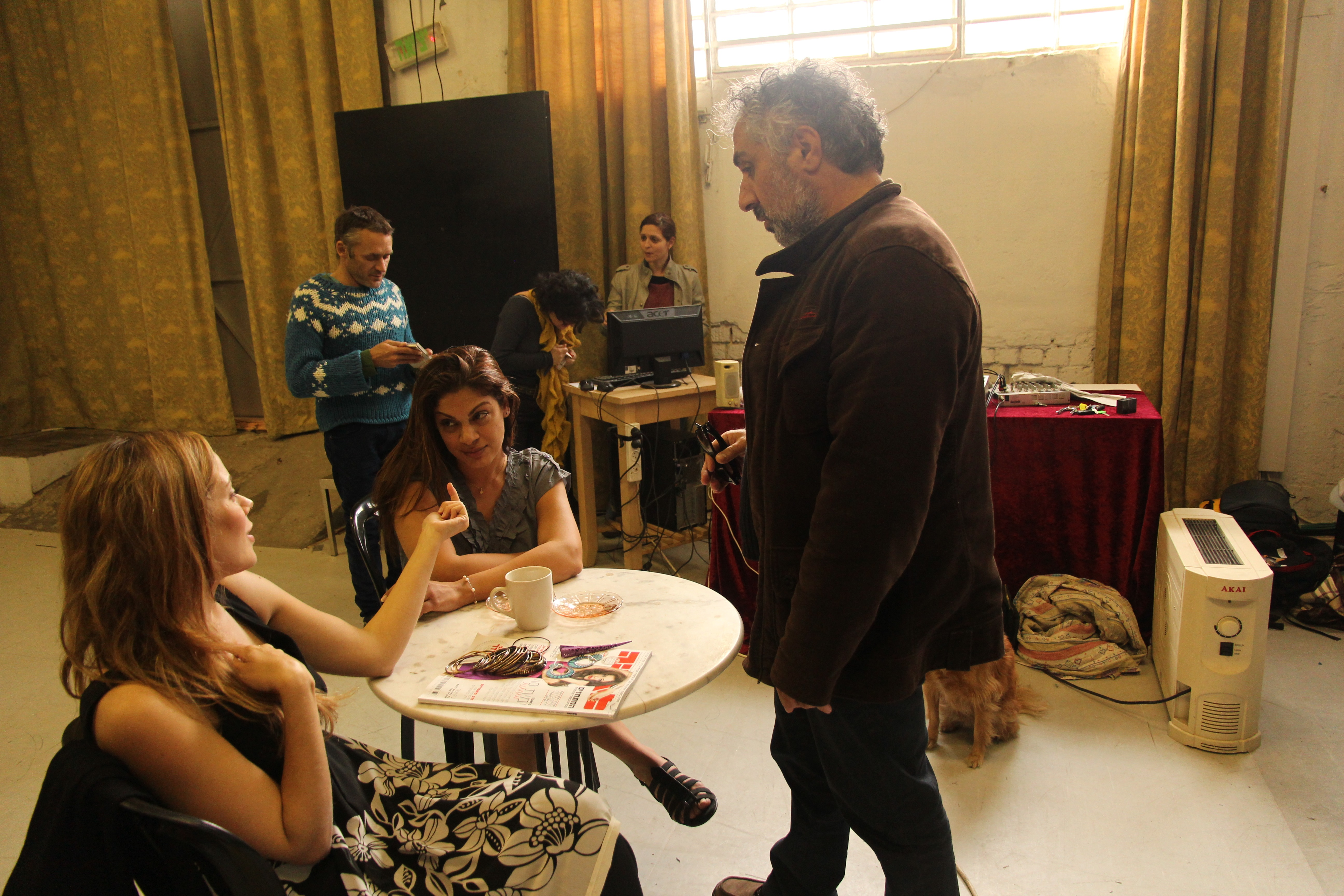 משחק מול מצלמה דובר קוסאשוילי